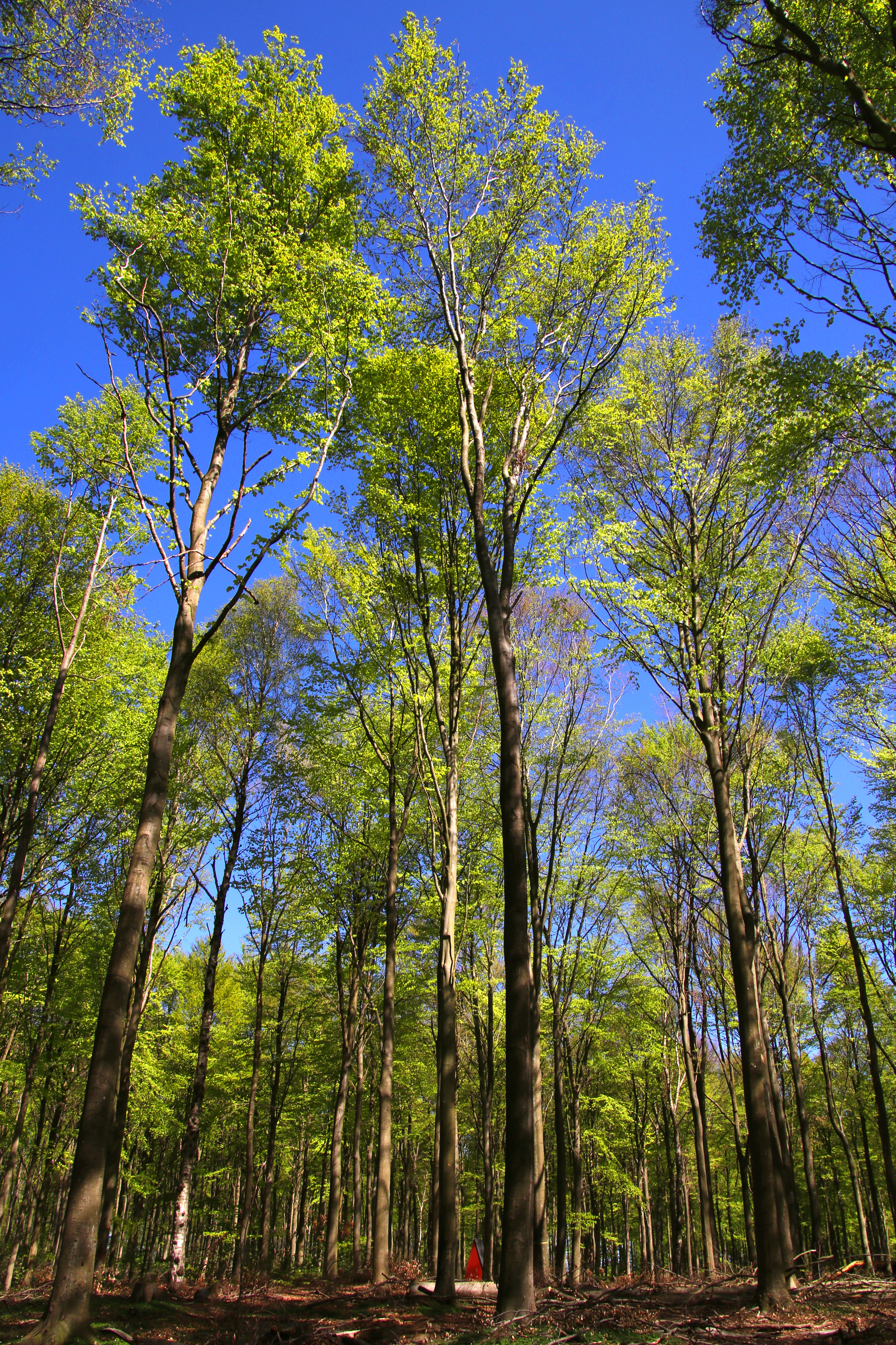 Espergærde. I Egebæksvang skov.